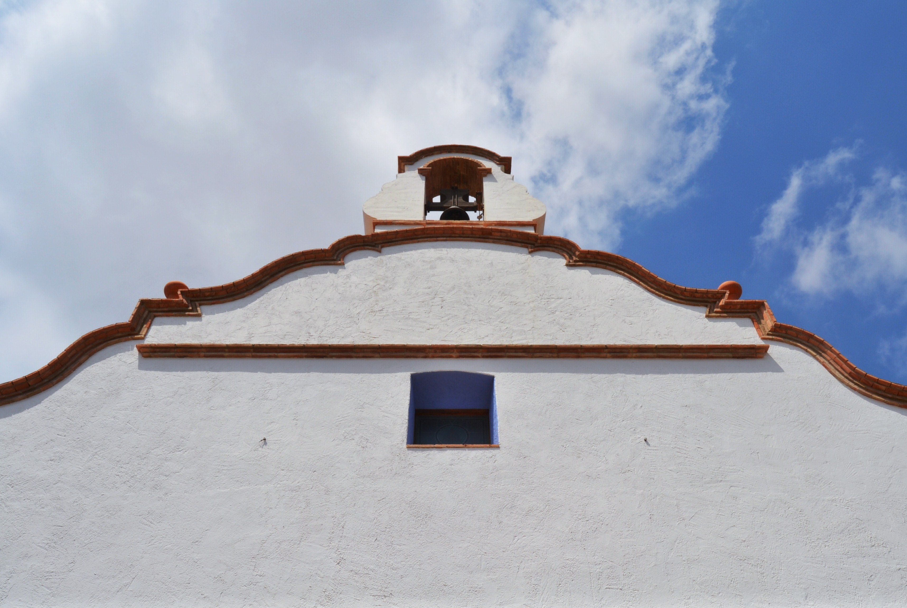 Part superior de la façana de l'ermita de la mare de Déu dels Afligits, Alfara de la Baronia.